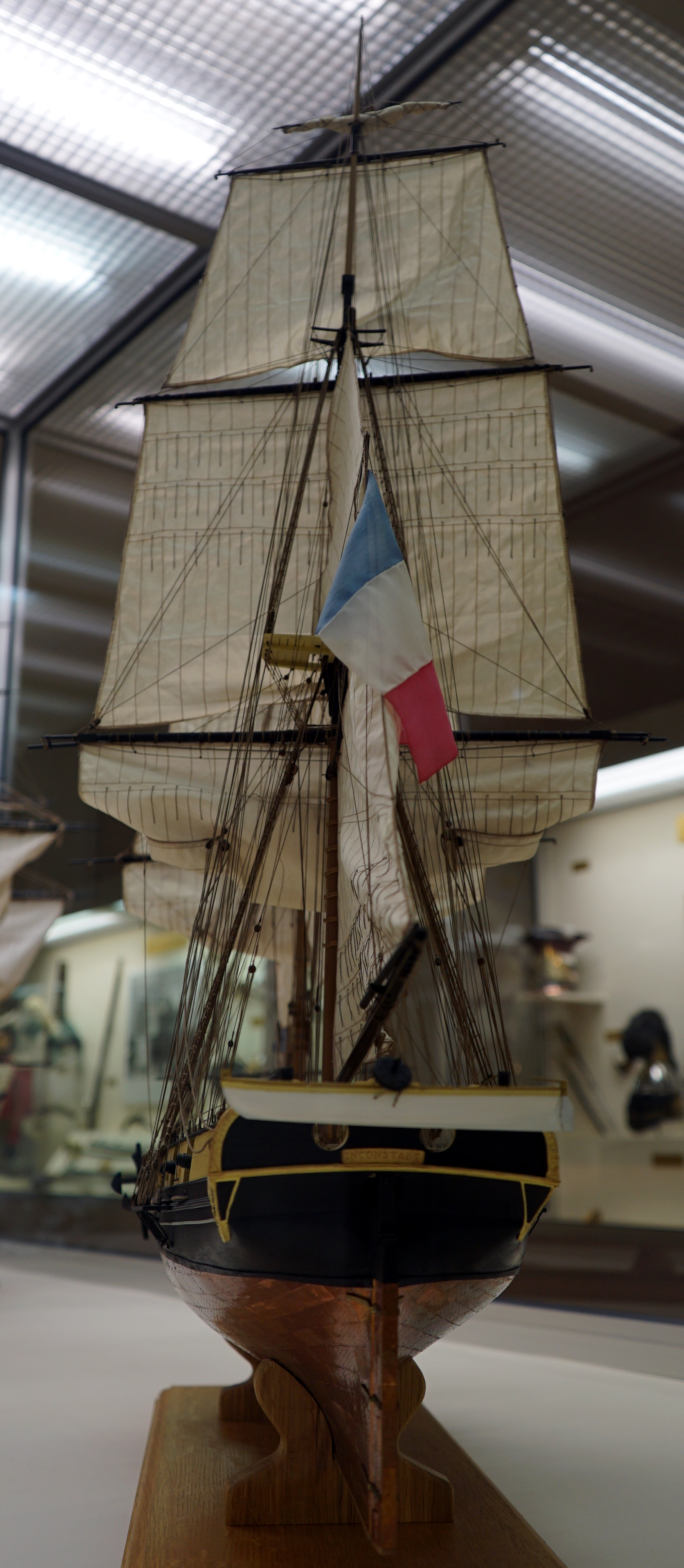 maquette du brick ayant ramené Napoléon de l'île d'Elbe en mars 1815.